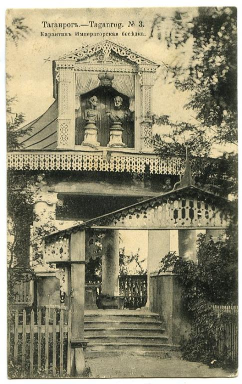 Императорская беседка в Елизаветинском парке, Таганрог Ростовская область РФ